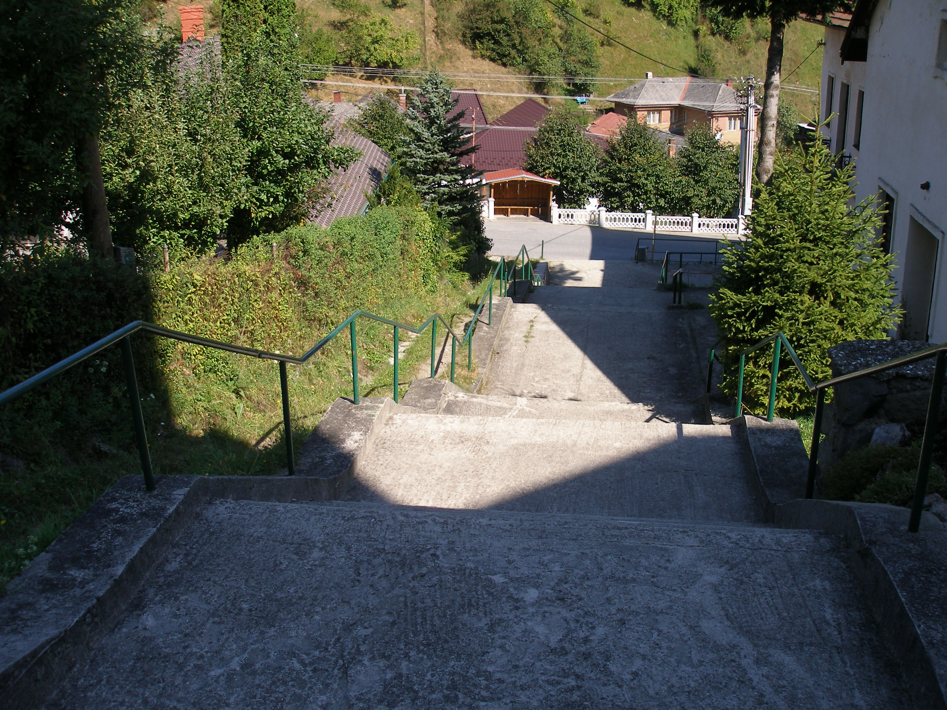 Spišská obec Žakarovce. Okres Gelnica.